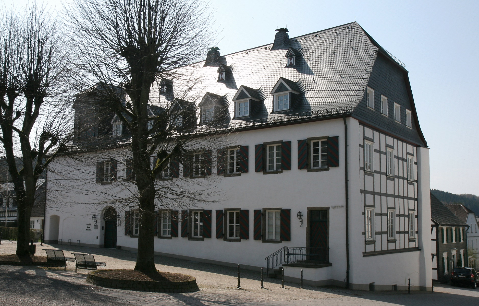 Altes Kloster in Drolshagen. This image shows a heritage building in Germany, located in the North Rhine-Westphalian city Drolshagen (no. 2).